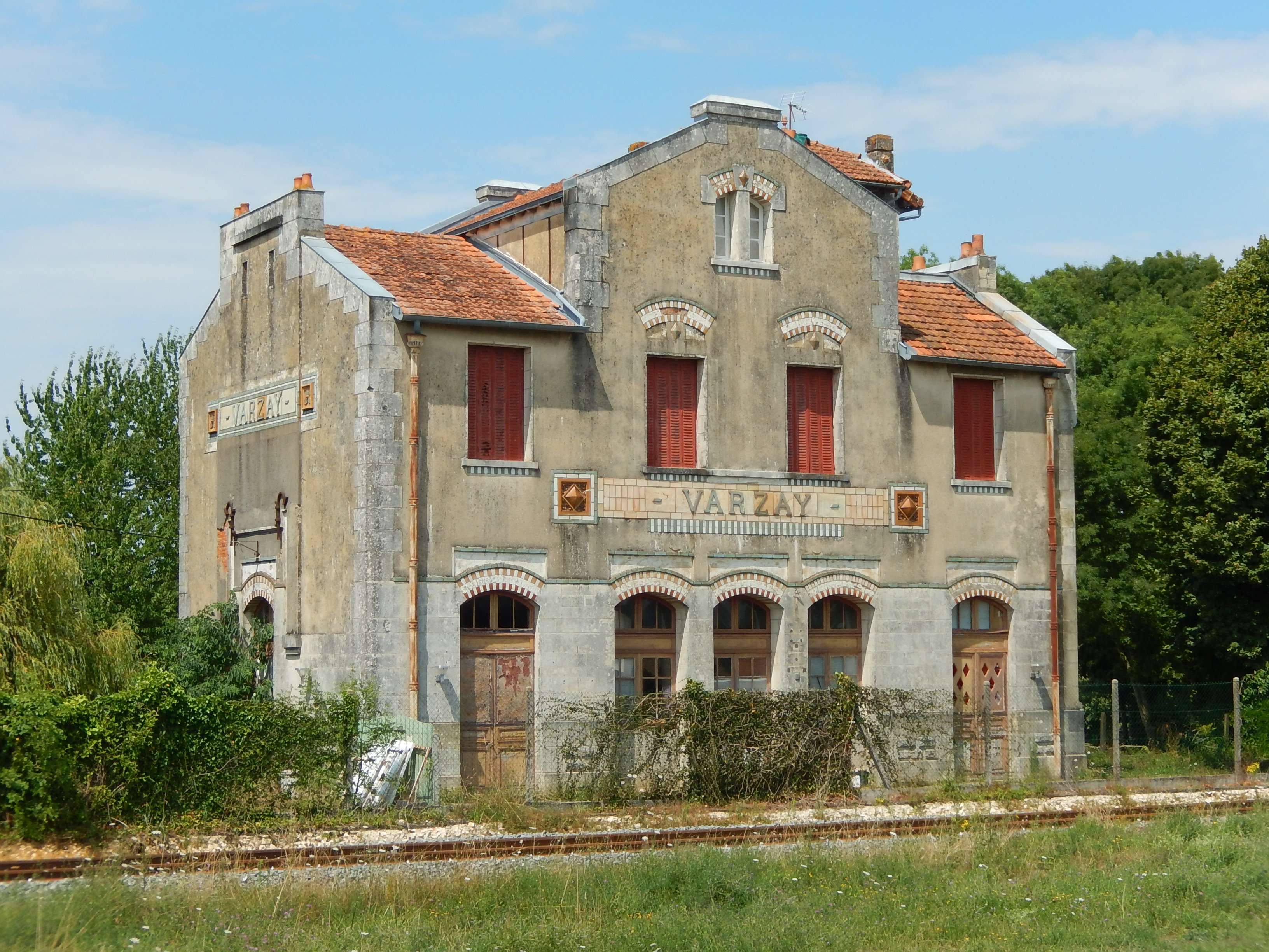 La gare ferroviaire de Varzay, aujourd'hui fermée au trafic.